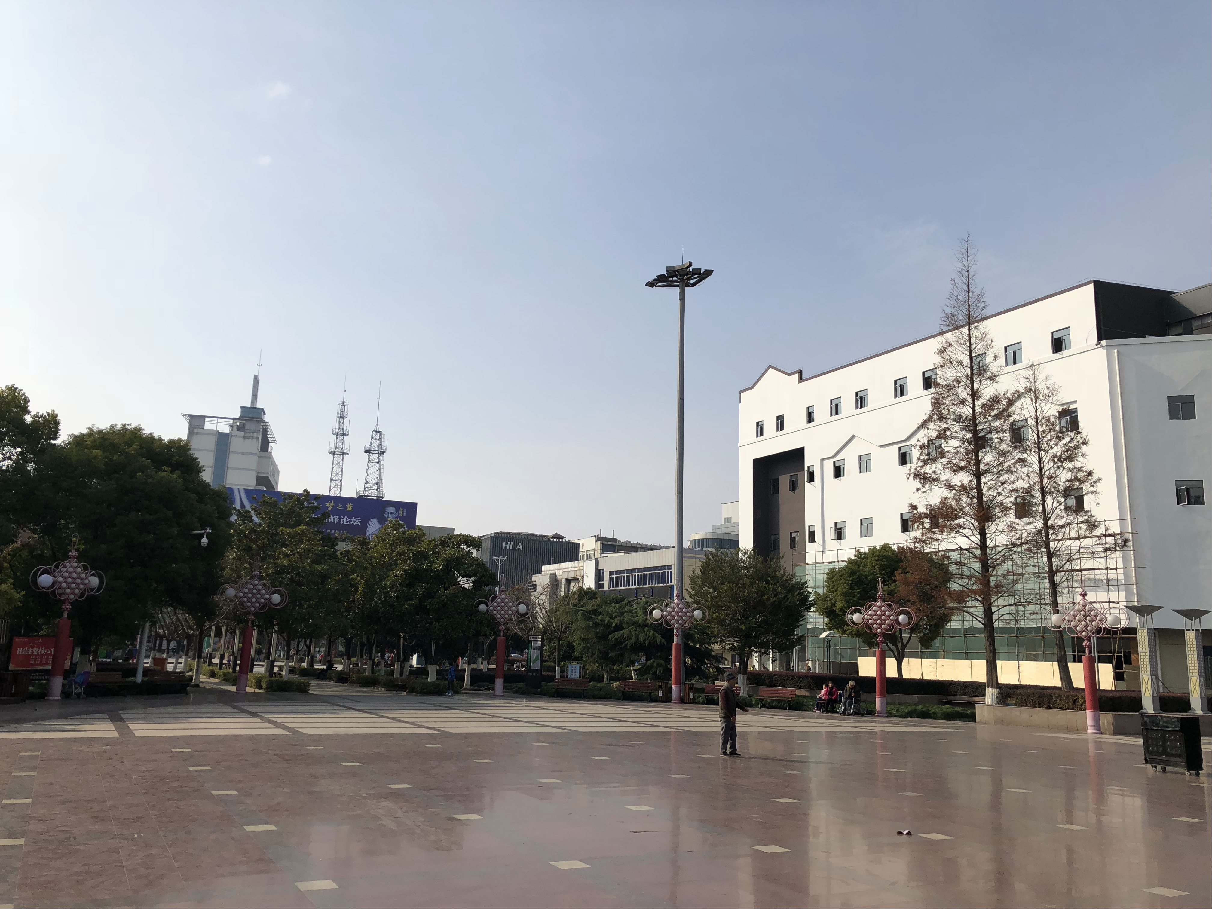 中文（中国大陆）: 太仓 中心广场